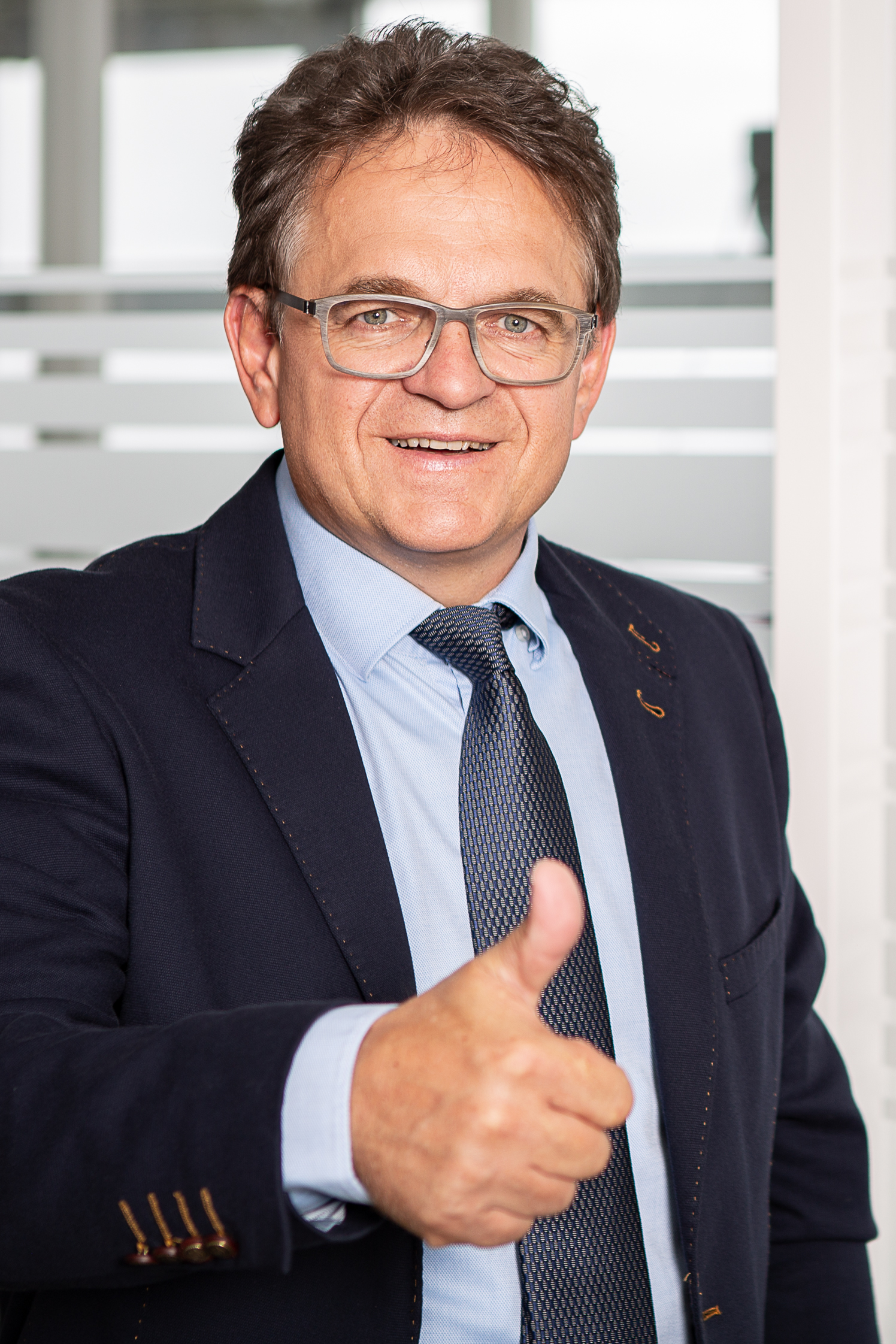 Gründer und Geschäftsführer der Paravan GmbH, CEO der Schaeffler Paravan Technologie GmbH